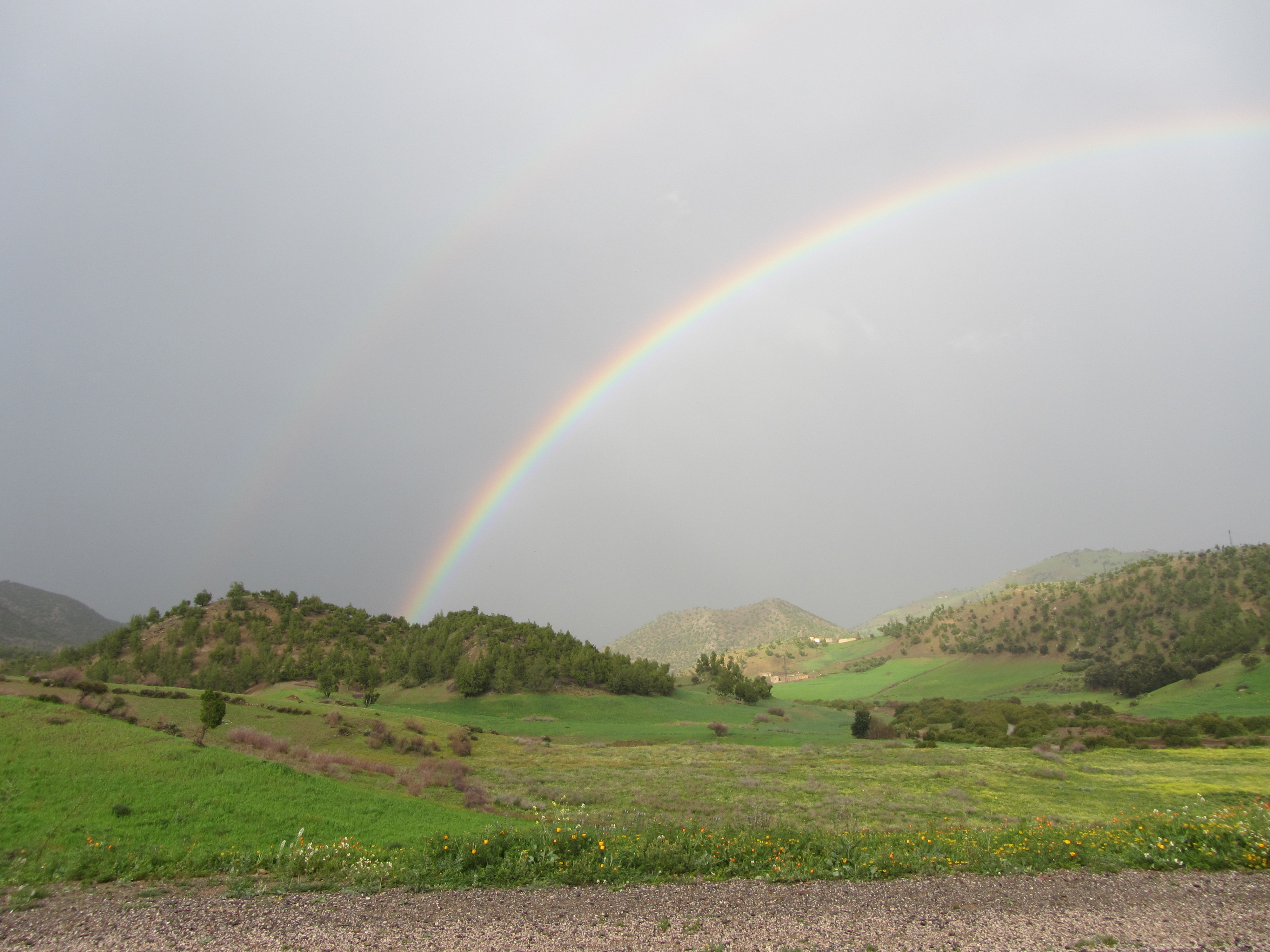 AGUELMOUS MAROC